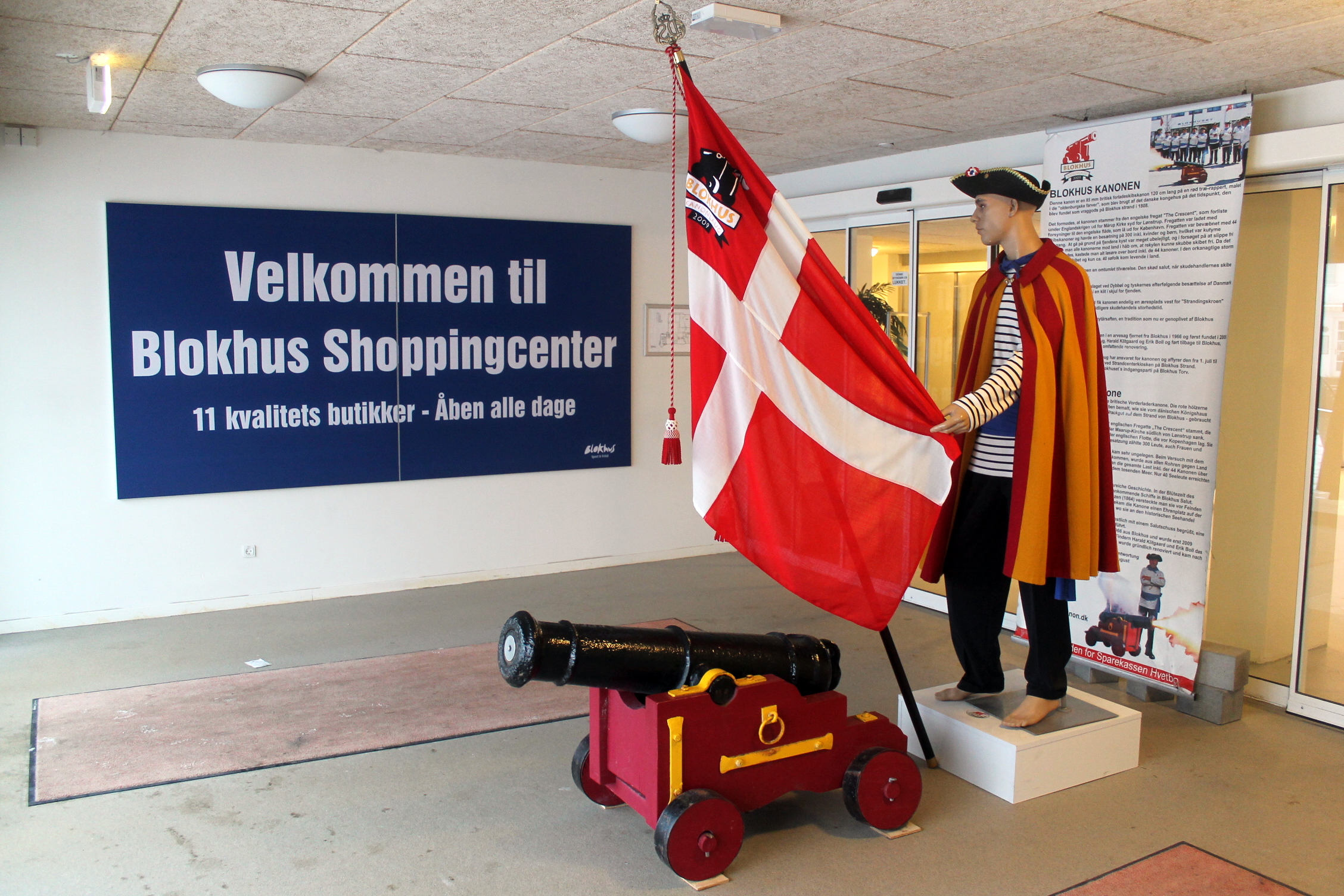 "Blokhus Kanonen" (fundet på Blokhus Strand i 1808) / Dannebrog / Blokhus Shoppingcenter